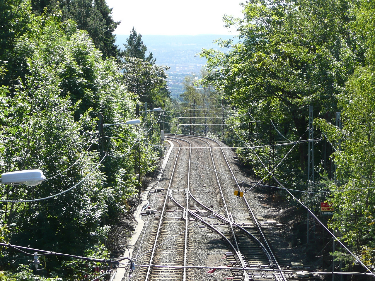 Holmenkollbanen of the Oslo Metro